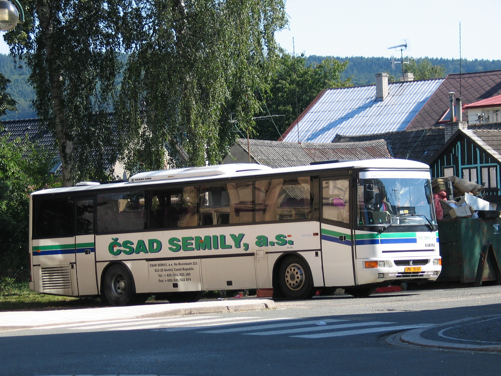 Karosa LC936, Lázně Bělohrad